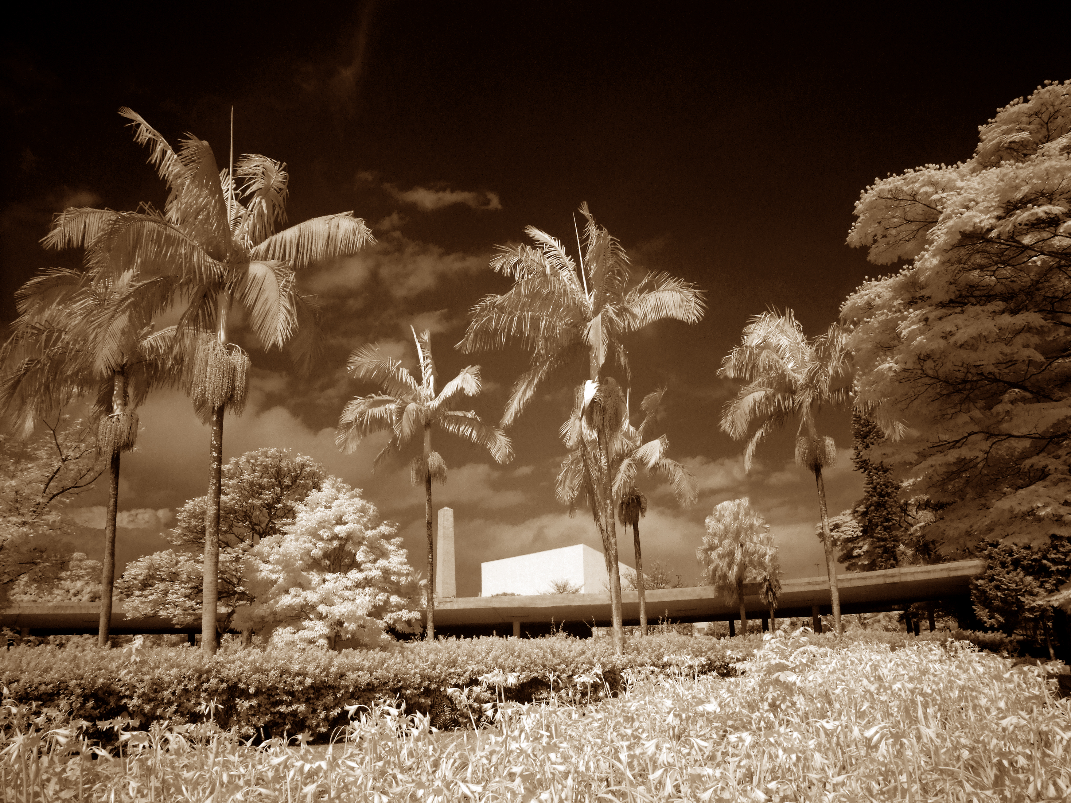 Auditorio,Obelisco,Marquize